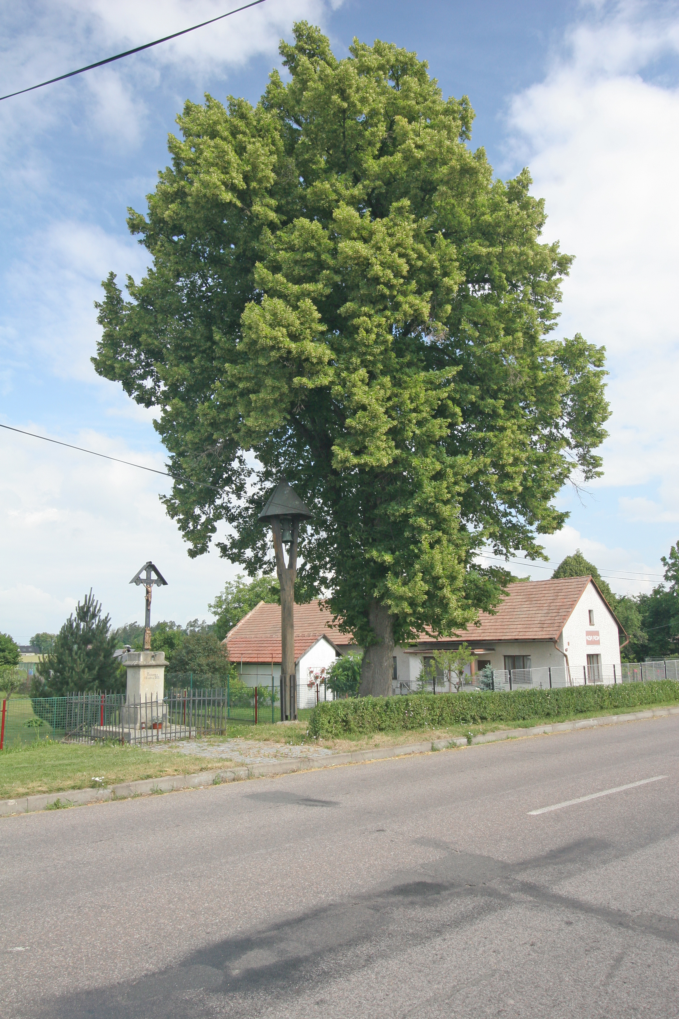 Hradiště na Písku zvonička